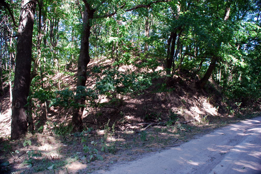 Мотронинське городище, Мельники, Холодний Яр